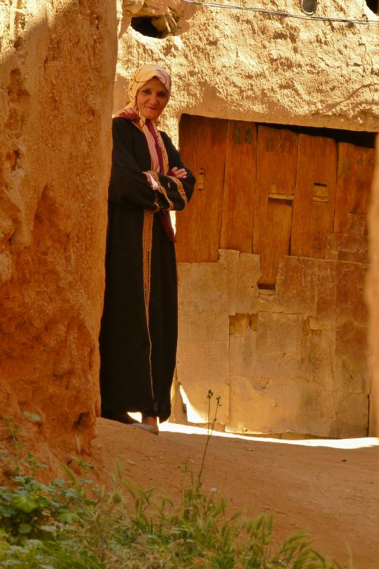 Vielle dame a El Kantara